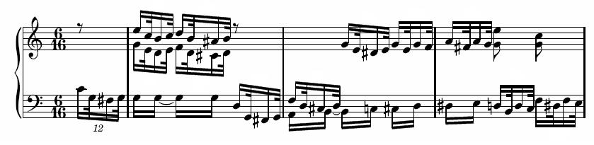 Description : seconde variation de l'arietta de la sonate pour piano n° 32 de Beethoven Auteur : propre travail réalisé avec Lilypond Licence : domaie public (auteur décédé depuis plus de 70 ans)